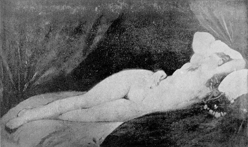 Ingres, étude pour la dormeuse de Naples, photo ancienne publiée par Henry Lapauze en 1911